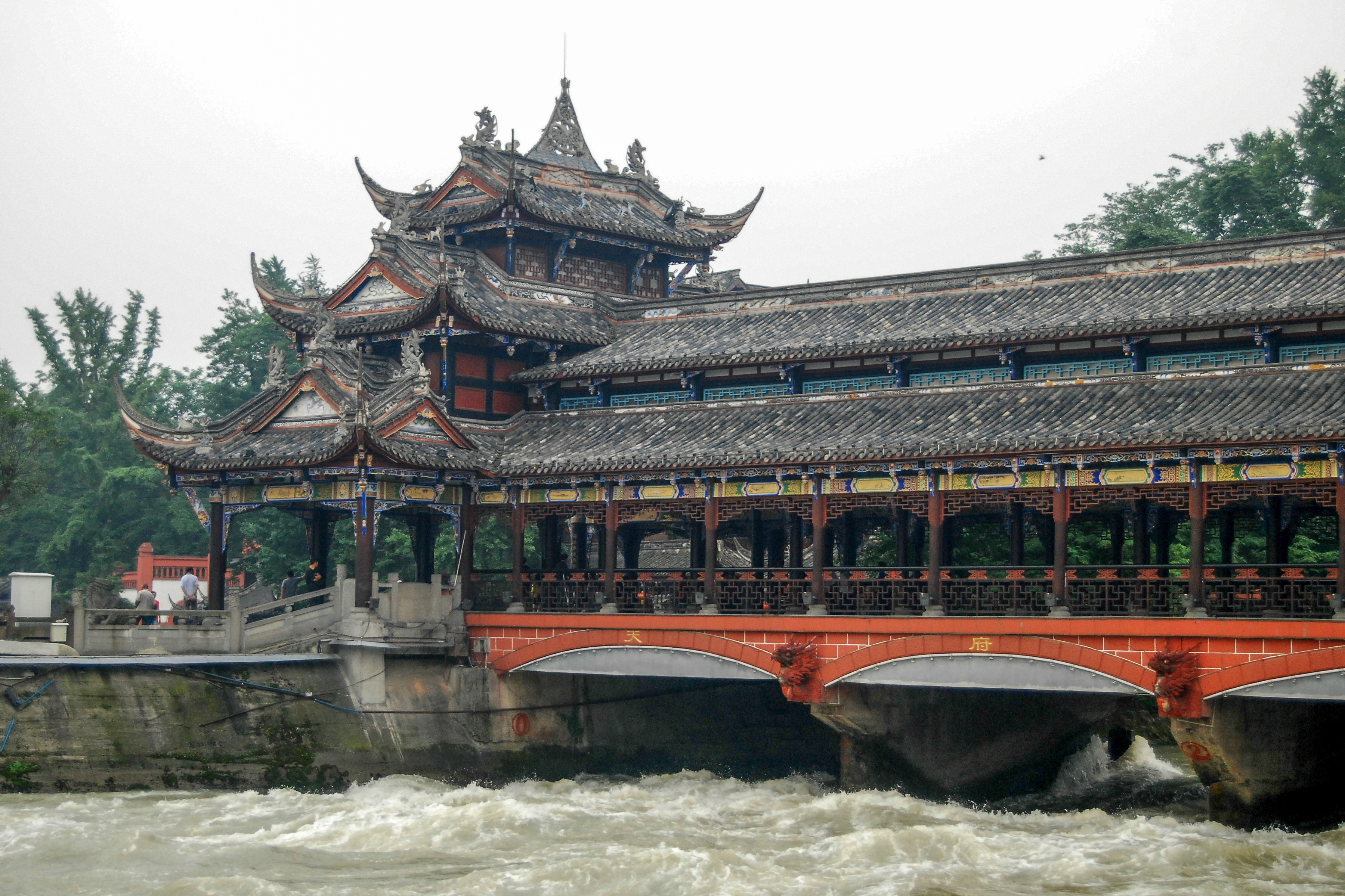 中文（中国大陆）: 都江堰南桥